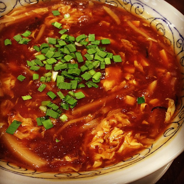 酸辣湯麺